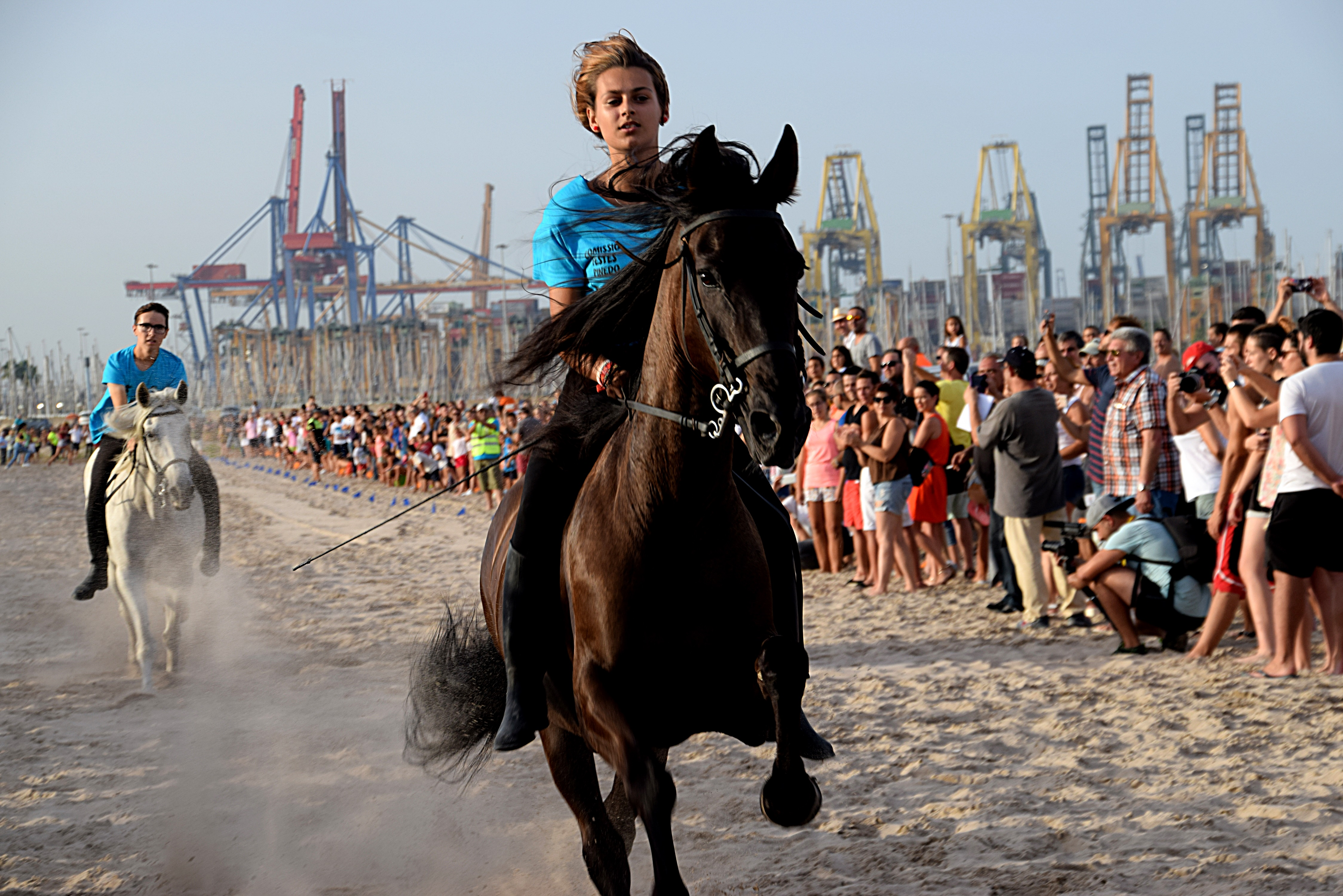 Desde hace más de 140 años se desarrollan “les Corregudes de Joies” durante las celebraciones de la “Festa Grossa”. En la “Correguda de Joies”, que se desarrolla en la playa, los jinetes recorren 700 metros a lomos de sus caballos sin utilizar ningún tipo de silla de montar y llevando la “joia” atada al cuello. Esta “joia” consiste en un pañuelo de seda de distinto color sobre una corona de laurel, que antiguamente se regalaba a la mujer amada al finalizar la carrera.